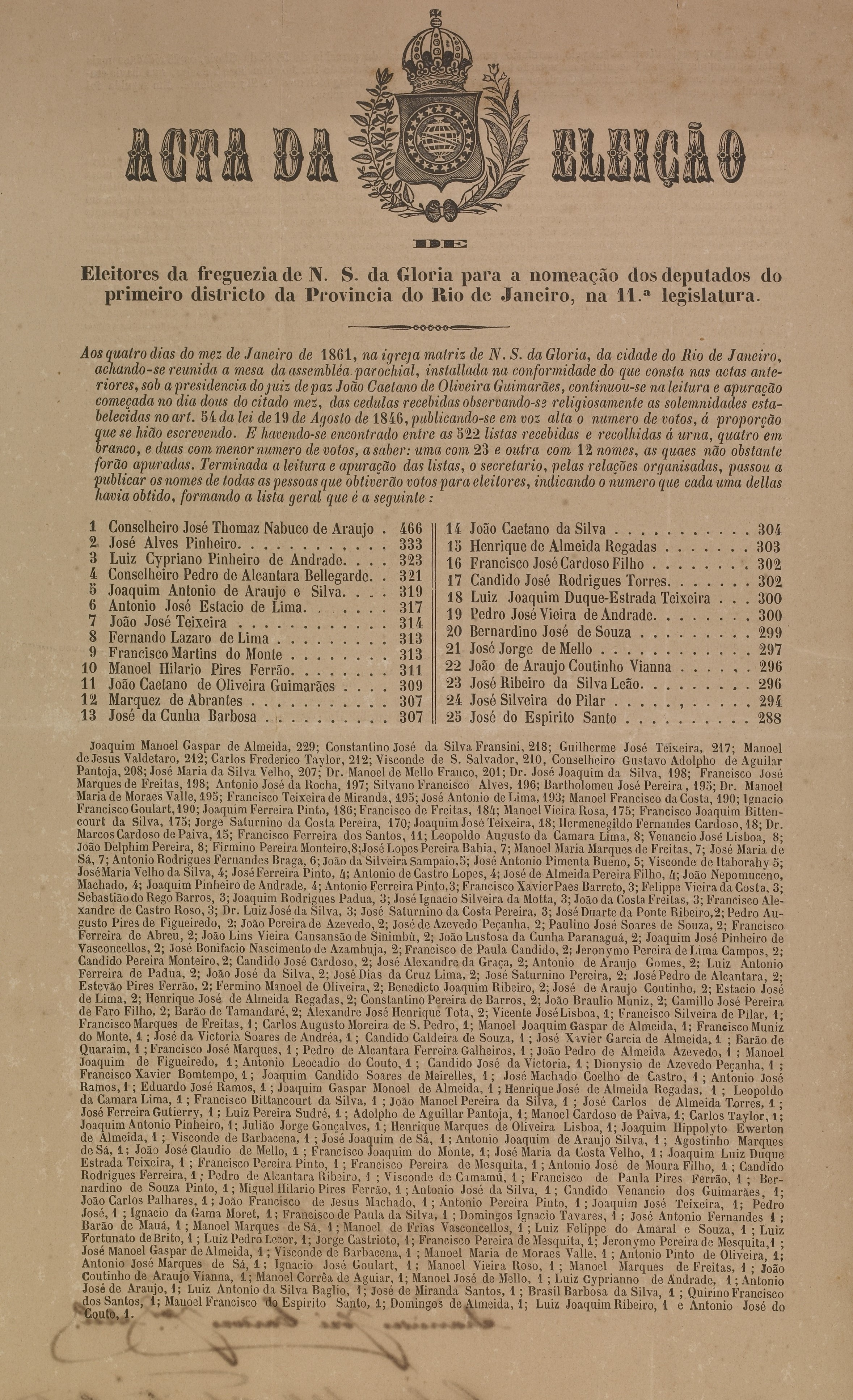 Primeira página da ata da eleição da freguesia de Nossa Senhora da Glória, para a nomeação dos deputados do primeiro distrito da Província do Rio de Janeiro para a 11ª legislatura (1861-1864). Fundo: Família Henrique Luís de Niemeyer Bellegarde.